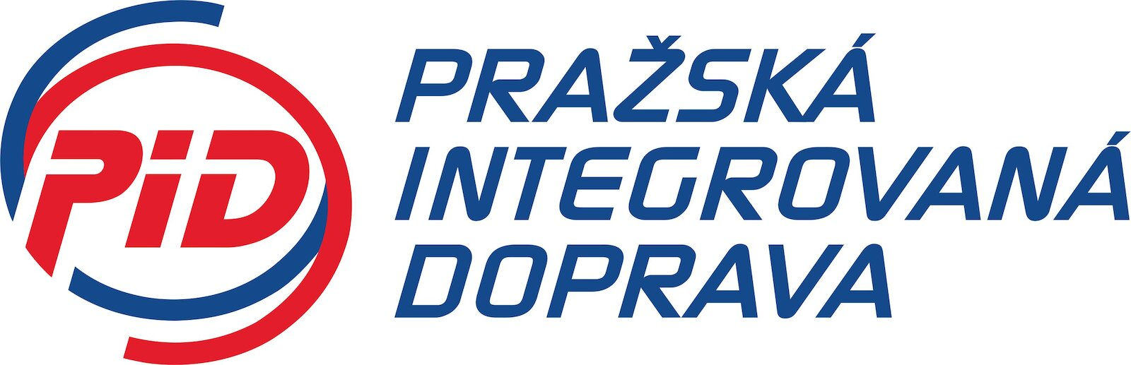 Logo PID (Zdroj